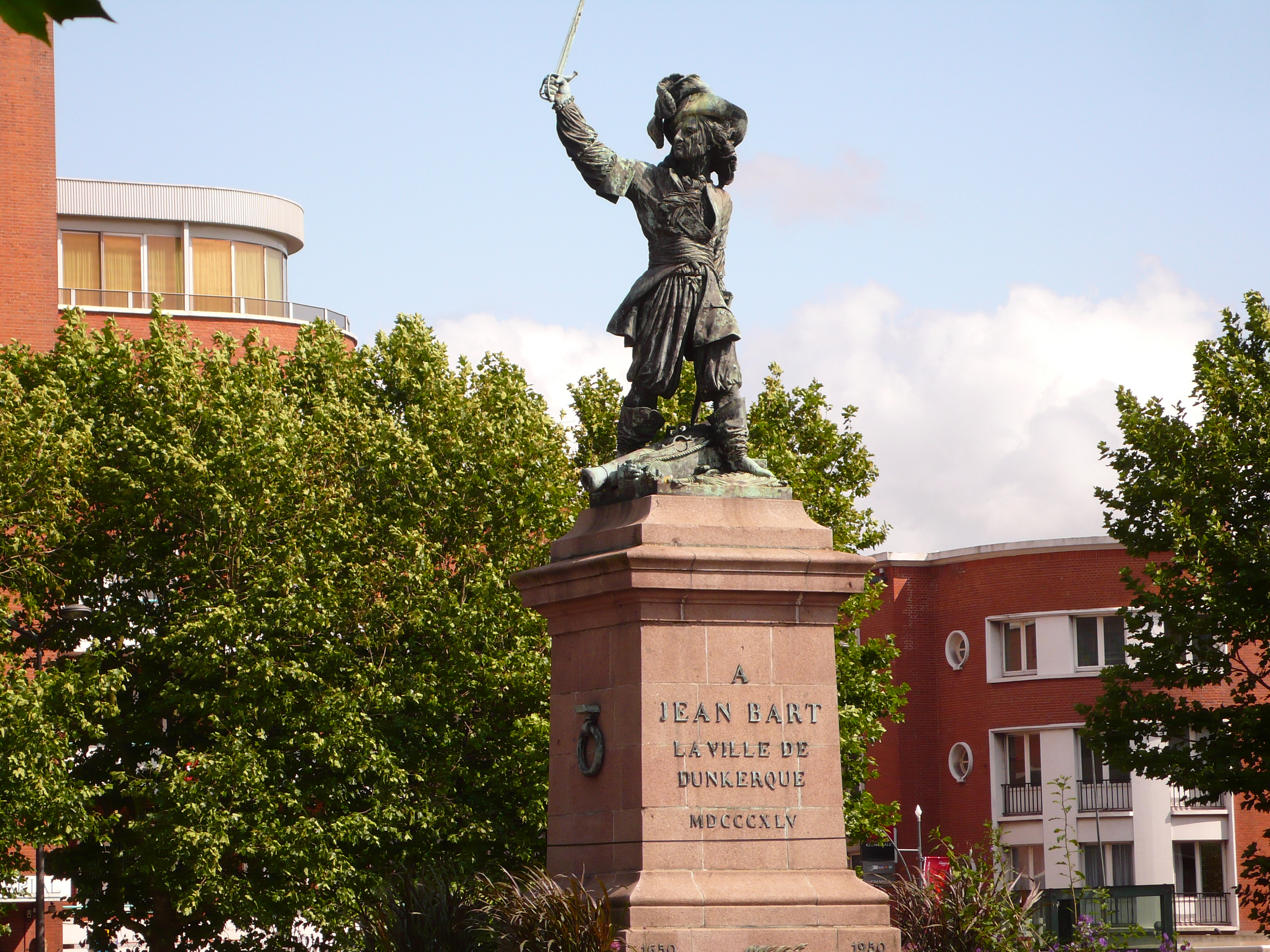 Dunkerque, Jean Bart